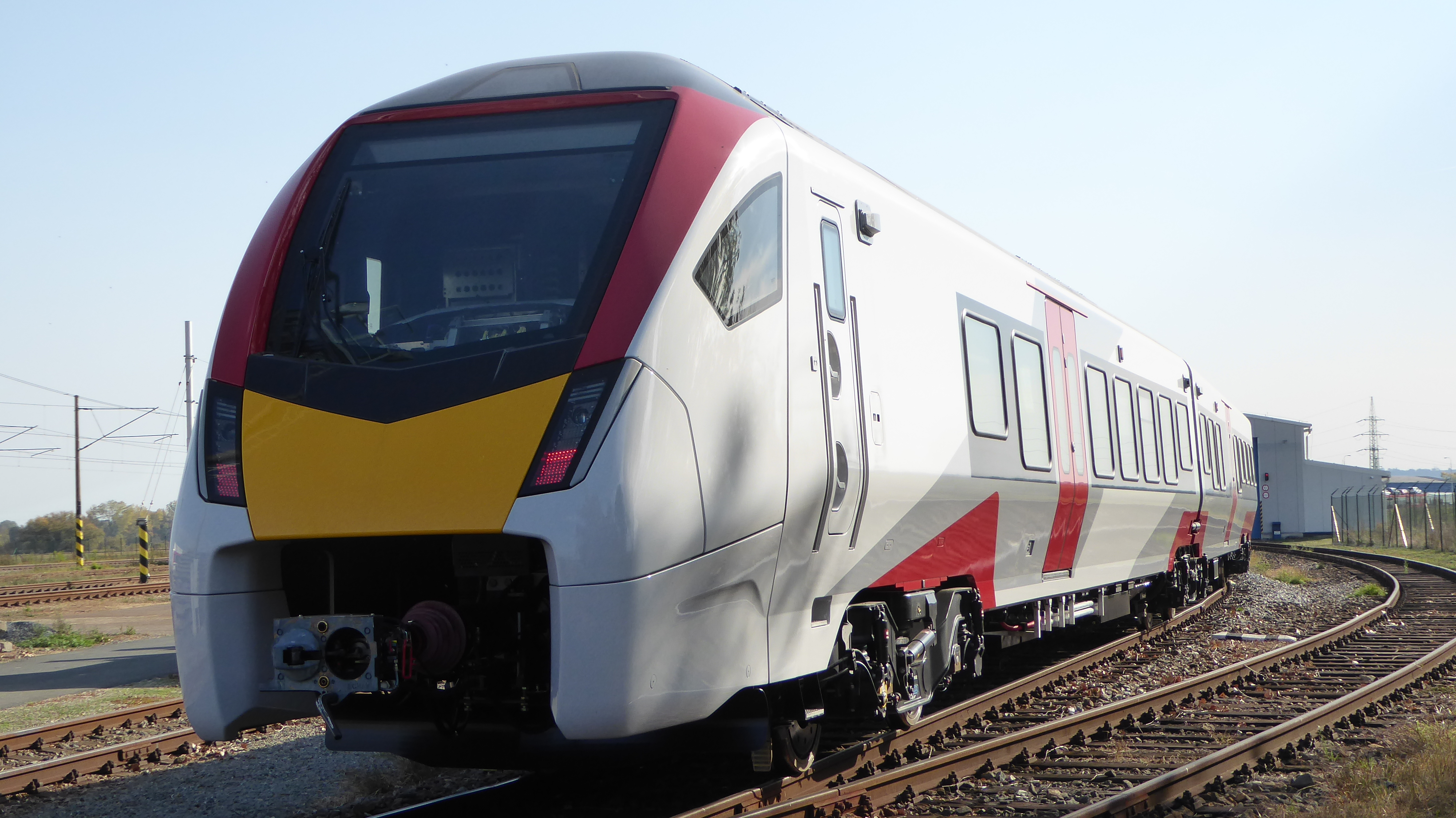 British Rail Class 745 auf dem Eisenbahnversuchsring Velim (CZ). Der Triebzug trägt noch keine Anschriften, aber an einem Fenster hängt ein Blatt mit Informationen in deutscher Sprache:Technische AnschriftL-4377 EMU12 UK East AngliaWagen MFahrzeug: 94700312101-1Bremsgewicht: 442 t 120 %Gewicht: 370 tLänge: 234 m